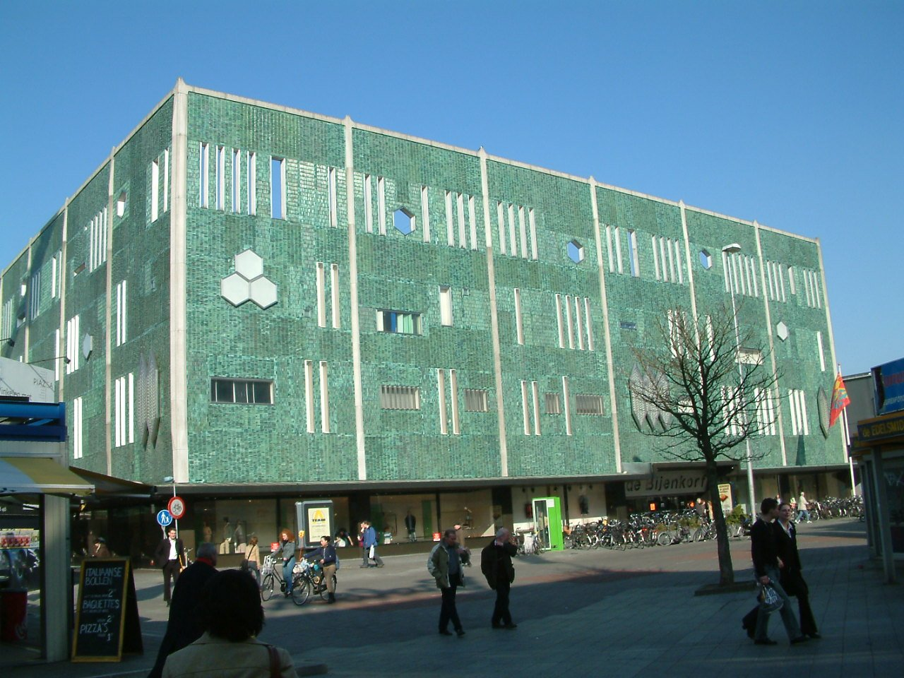 De Bijenkorf in Eindhoven, aan het 18 septemberplein ontworpen door Gio Ponti